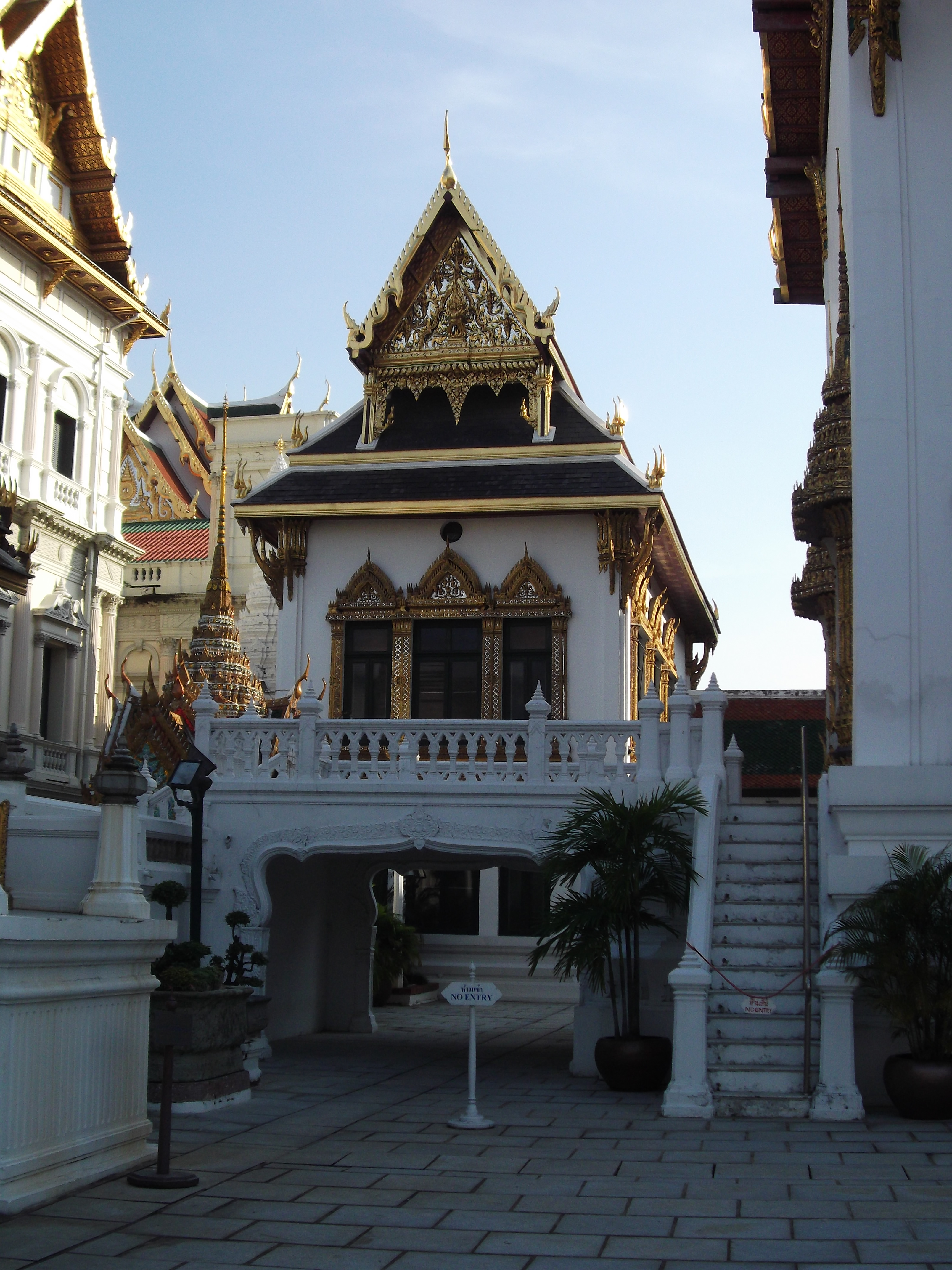 พระบรมมหาราชวังและวัดพระศรีรัตนศาสดาราม